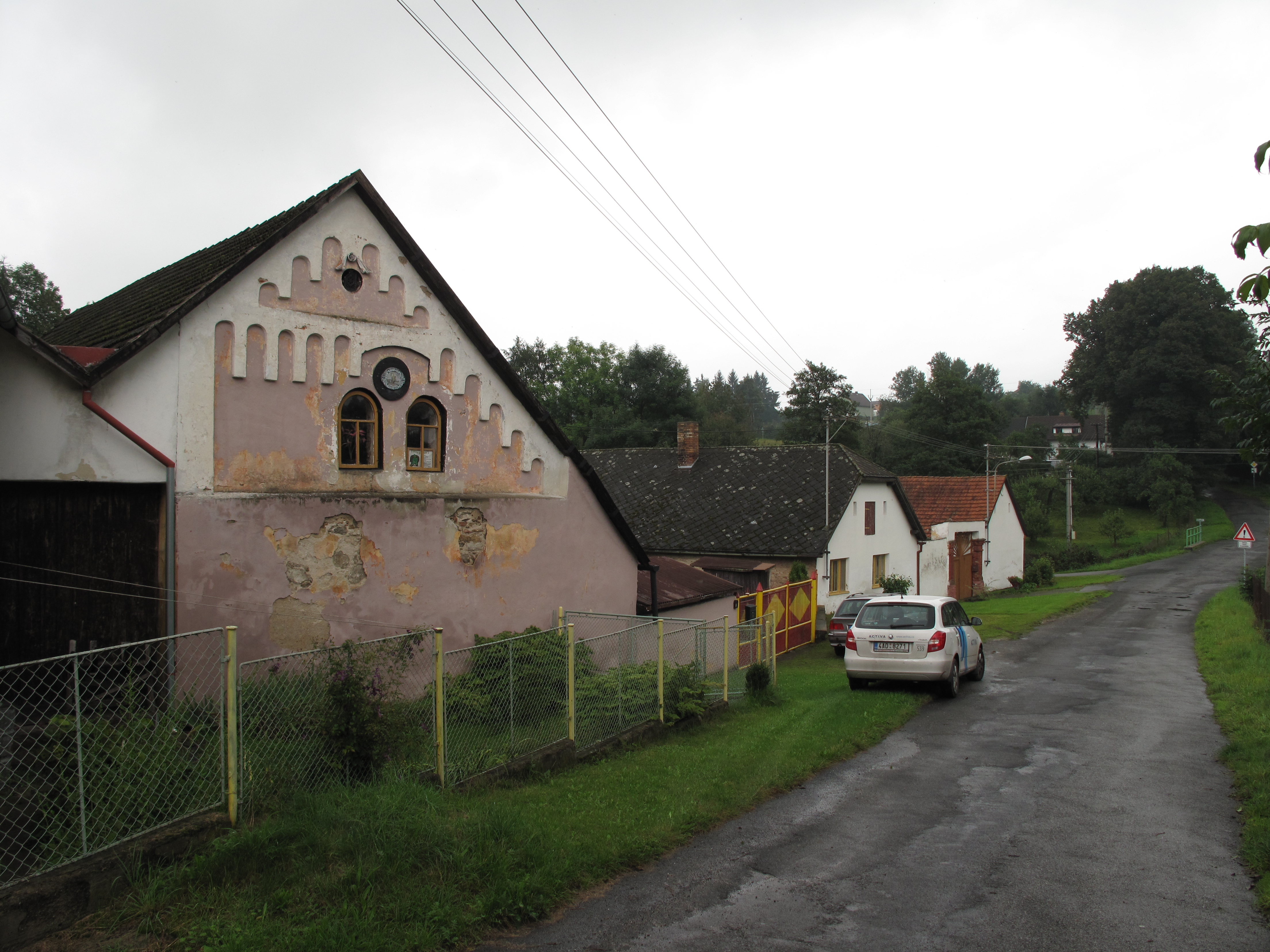 V údolí Radešova. Okres Strakonice, Česká republika.